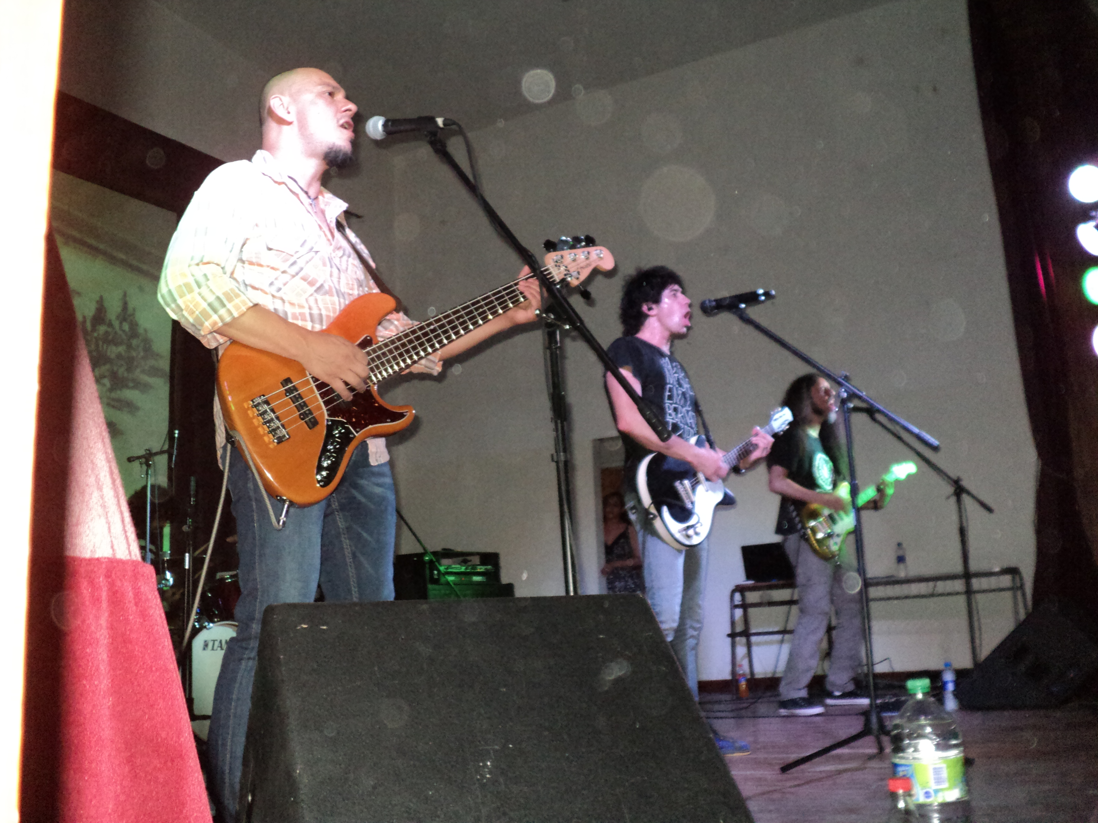 rescate en 2011, ulises el bajista y el guitarrista